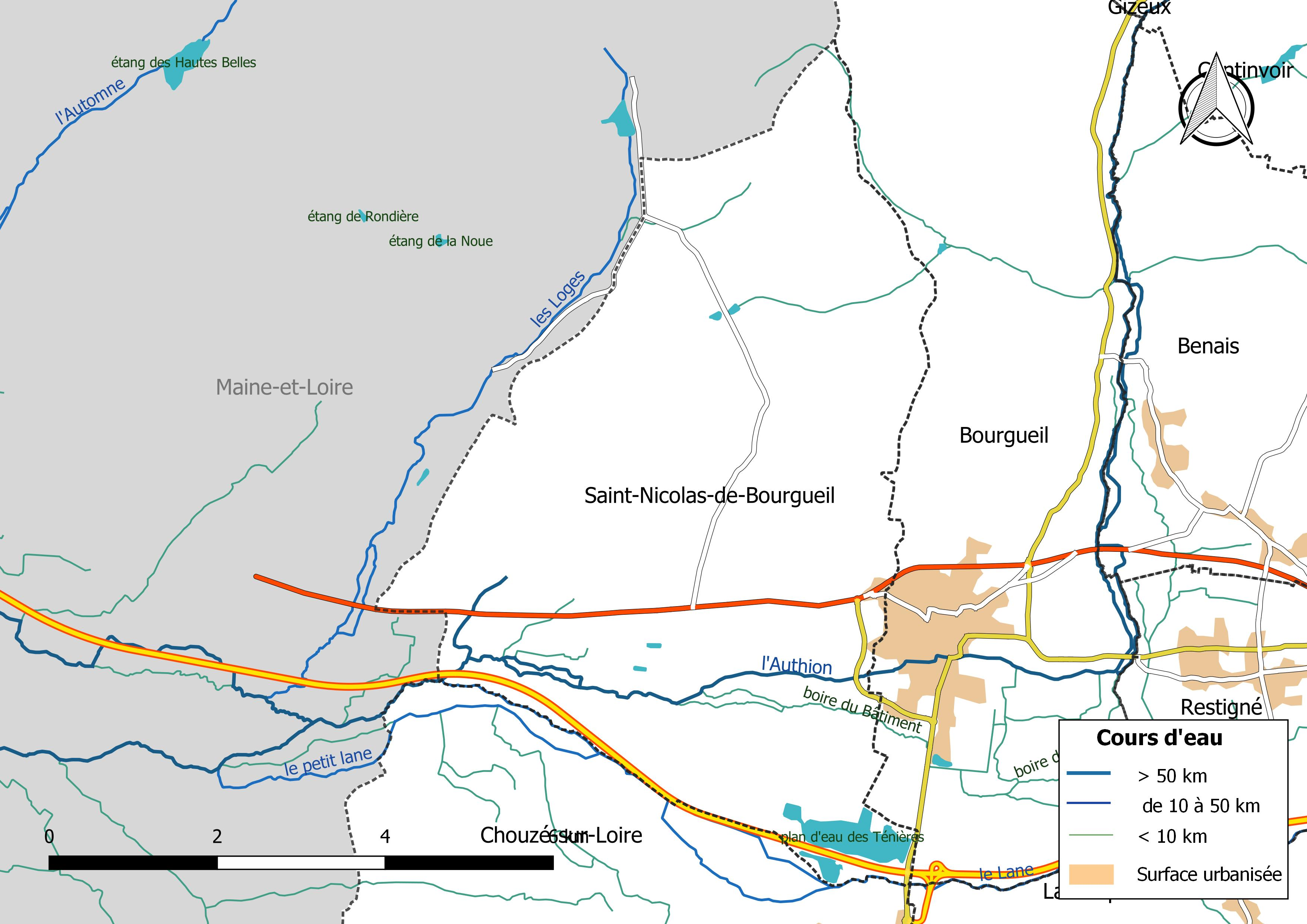 Carte du réseau hydrographique de la commune de Saint-Nicolas-de-Bourgueil (France).